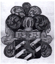 Détail d'un document établissant la généalogie de la branche Colonges-Laurière (avant 1688) (Coll. part.)